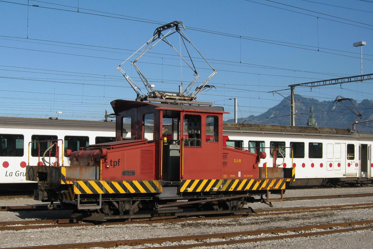 Traktor Te 2/2 11 der Freiburgische Verkehrsbetriebe (tpf), französisch Transports publics fribourgeois, in Bulle im November 2011.